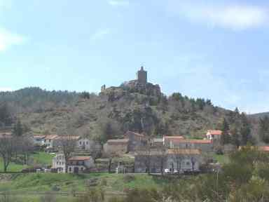 Vue du village de LUC et du chateau